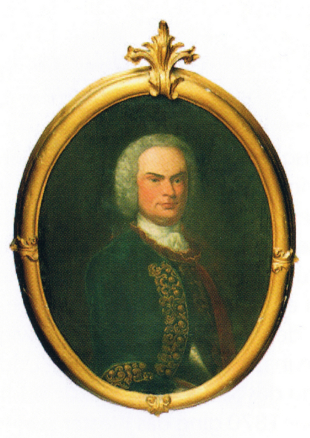 Peter Reichsgraf zu Rantzau (1733-1809), Königich Dänischer Kammerherr und Regierungsrat in Glückstadt, Klosterprobst zu Uetersen.